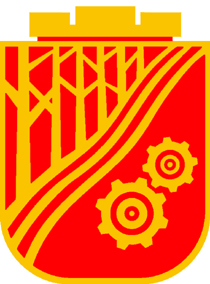 Symbolikken i kommunevåpenet er slik: Trærne oppe til venstre står for skog og skogsdrift. Tannhjulene viser industrien - Vennesla er kjent for å være en industribygd, selv om dette har gått noe tilbake de senere år. Strekene på skrå er elva Otra som renner gjennom bygda. Den tredelte krona på toppen indikerer at Vennesla kommune tidligere bestod av 3 småkommuner: Hægeland, Øvrebø og Vennesla. Disse ble slått sammen til en kommune i 1964. Bygdemerket som det den gang het, ble tegnet av Alf Erikstad daværende byarkitekt i Kristiansand. Vennesla formannskap godkjente det i 1971.